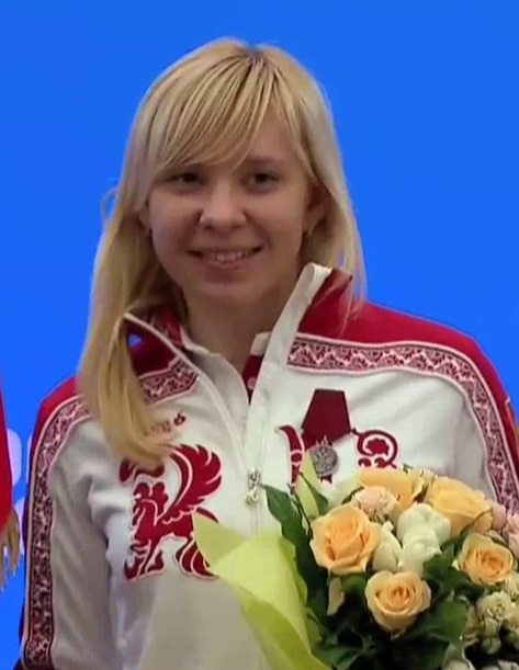 Юлия Скокова